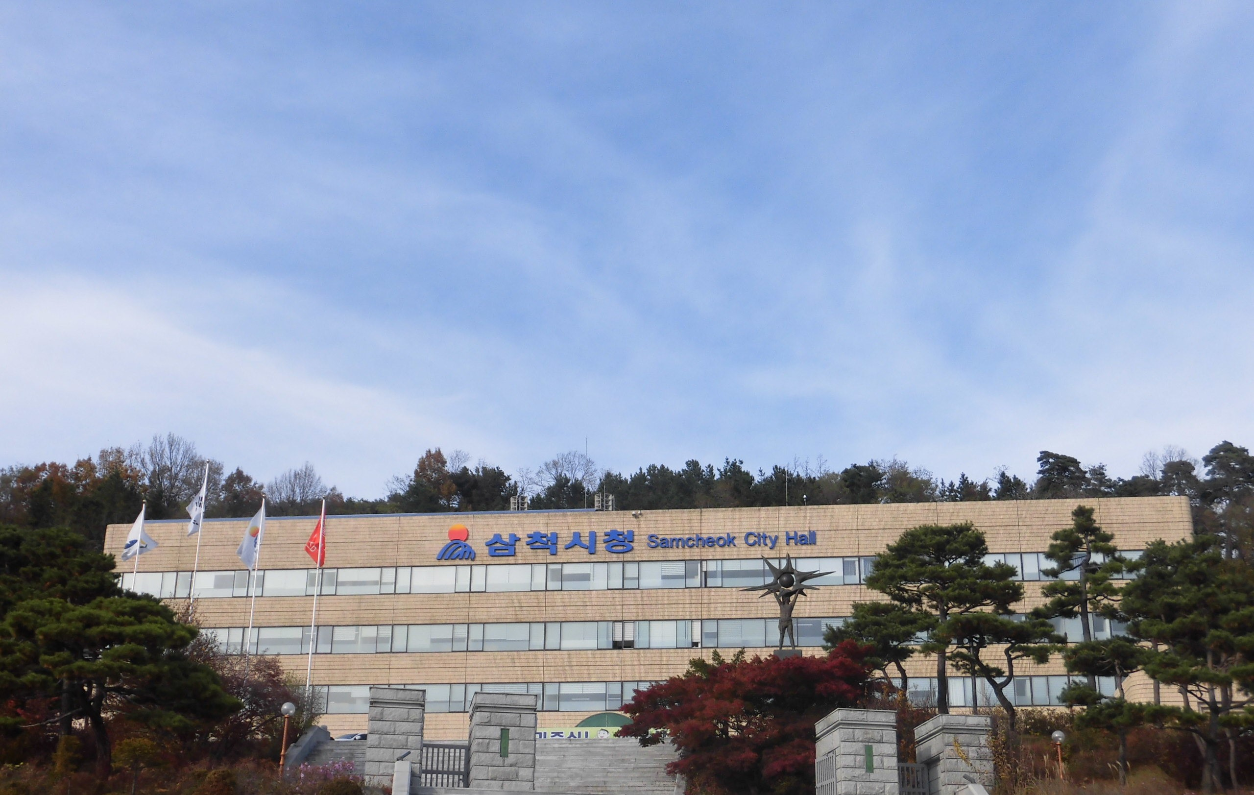 강원도 삼척시에 있는 삼척시청